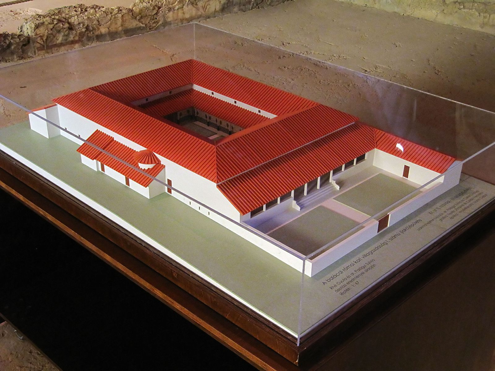 római villagazdaság romjai (Nemesvámos, BALÁCAPUSZTA, LIKASDOMB) This is a photo of a monument in Hungary. Identifier: 15525